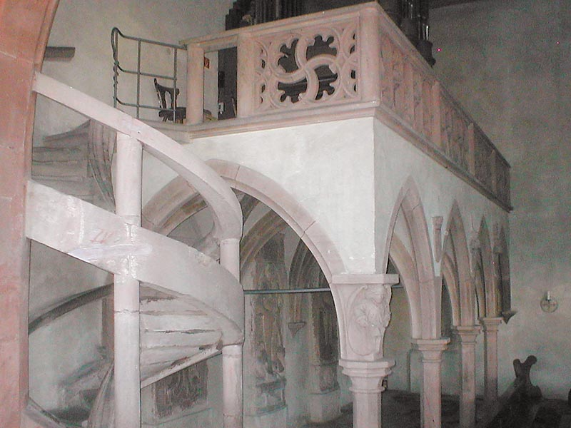 Gotische Galerie in der Klosterkirche Hirschhorn